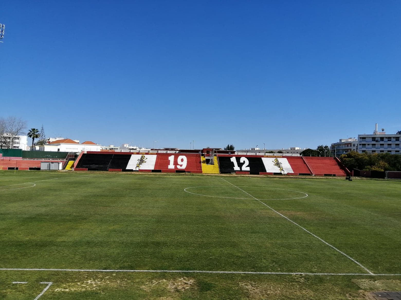 Stade José Arcanjo, Olhao